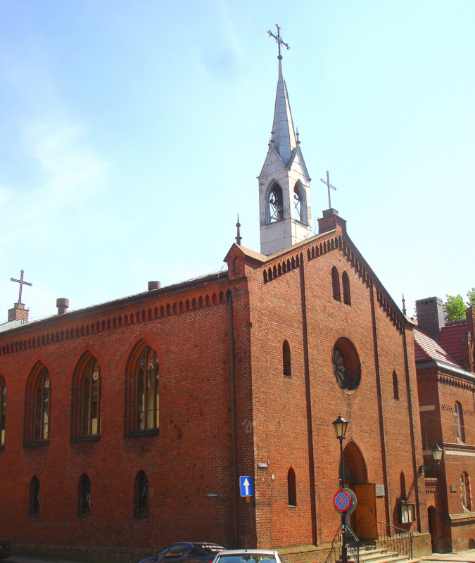 Kołobrzeg, zespół klasztoru ewangelickiego diakonis, ob. par. rzym.-kat.